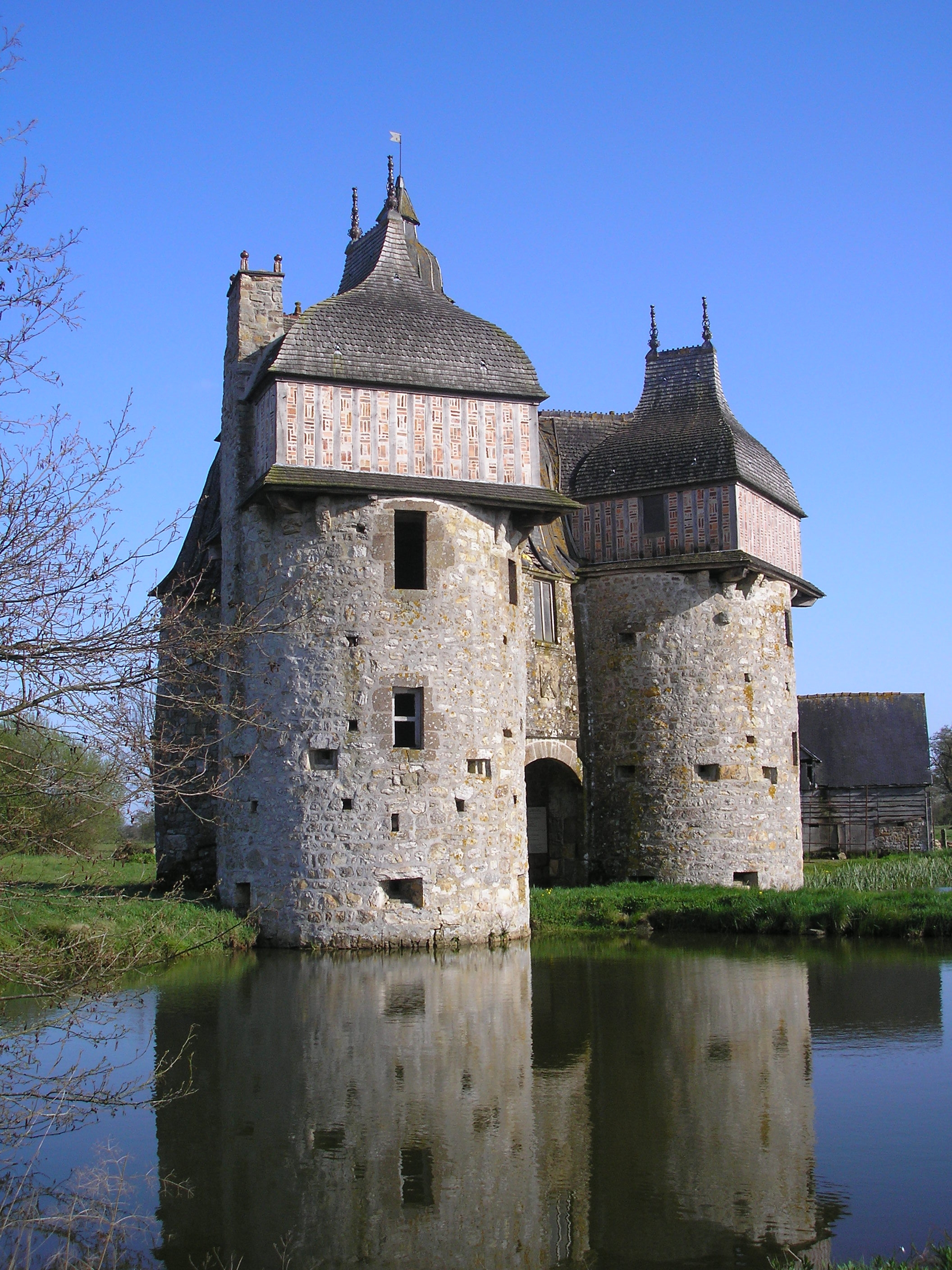 La Haute-Chapelle (Normandie, France). Le manoir de la Saucerie.